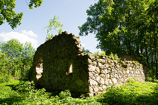 Ilzenbergo dvaro rūmų ansamblio statinys: ūkinis pastatas. Vaizdas iki 2012 metų rekonstrukcijos.